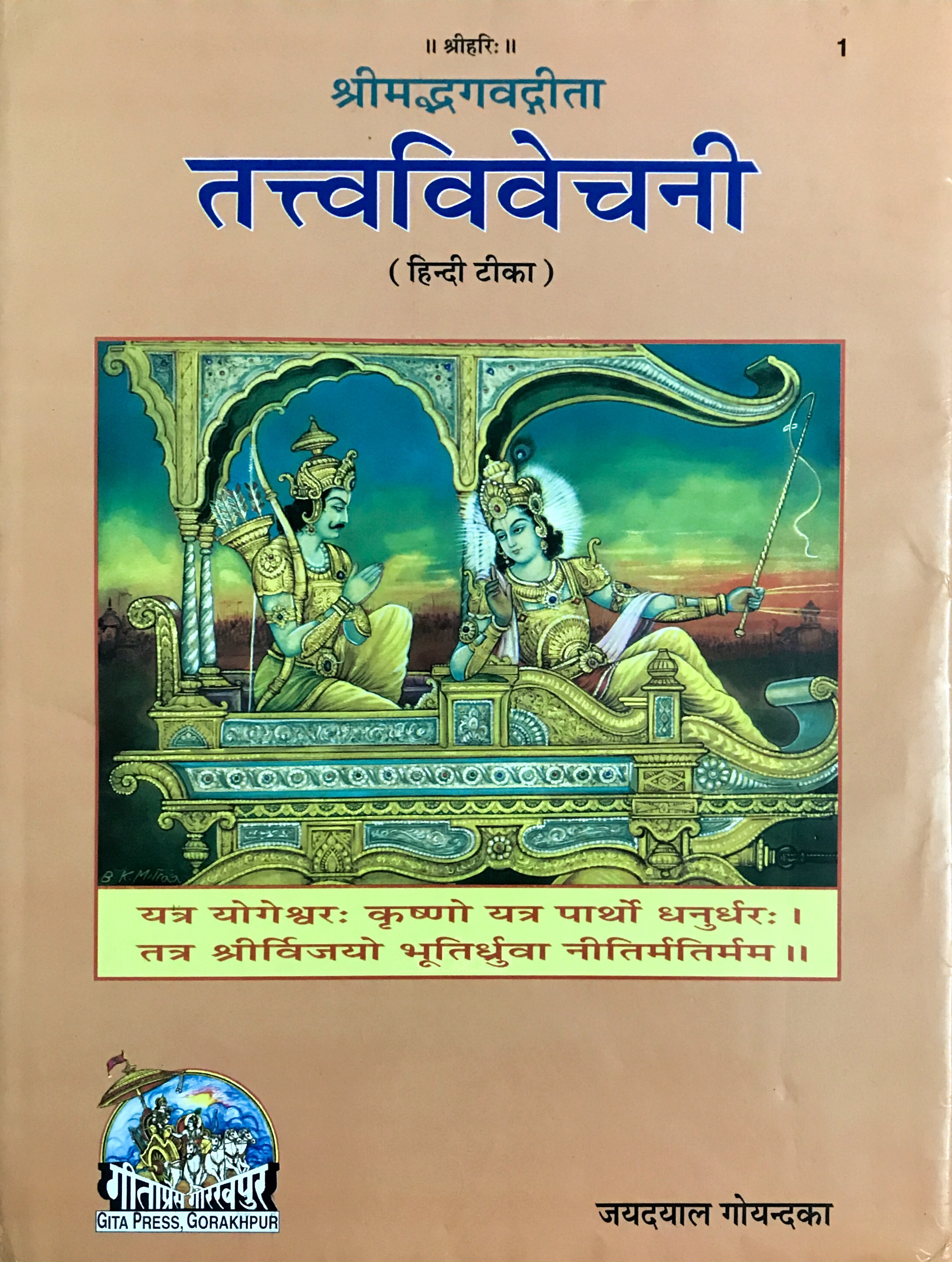 तत्वविवेचणी पुस्तक का आवरण